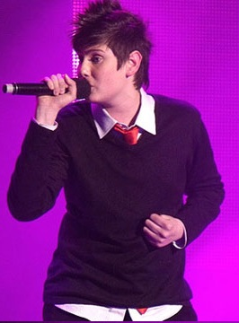 Stanley en Vivo